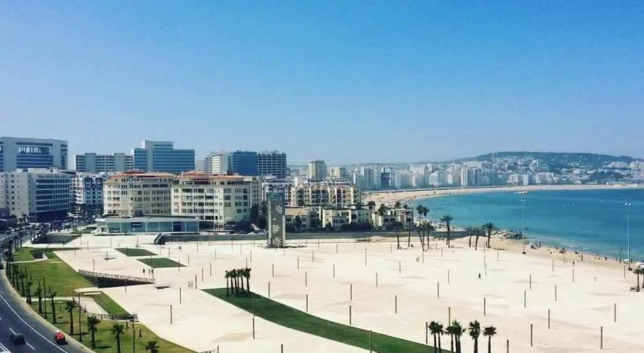 la cornich de tangier